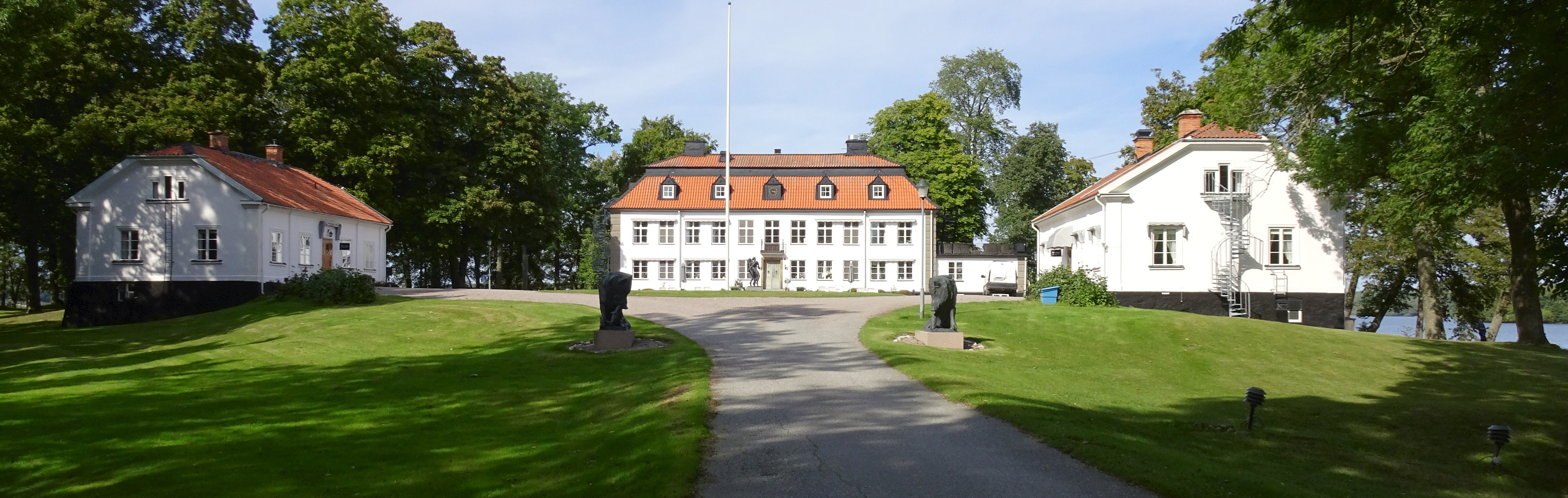 Skytteholms herrgård med flyglar